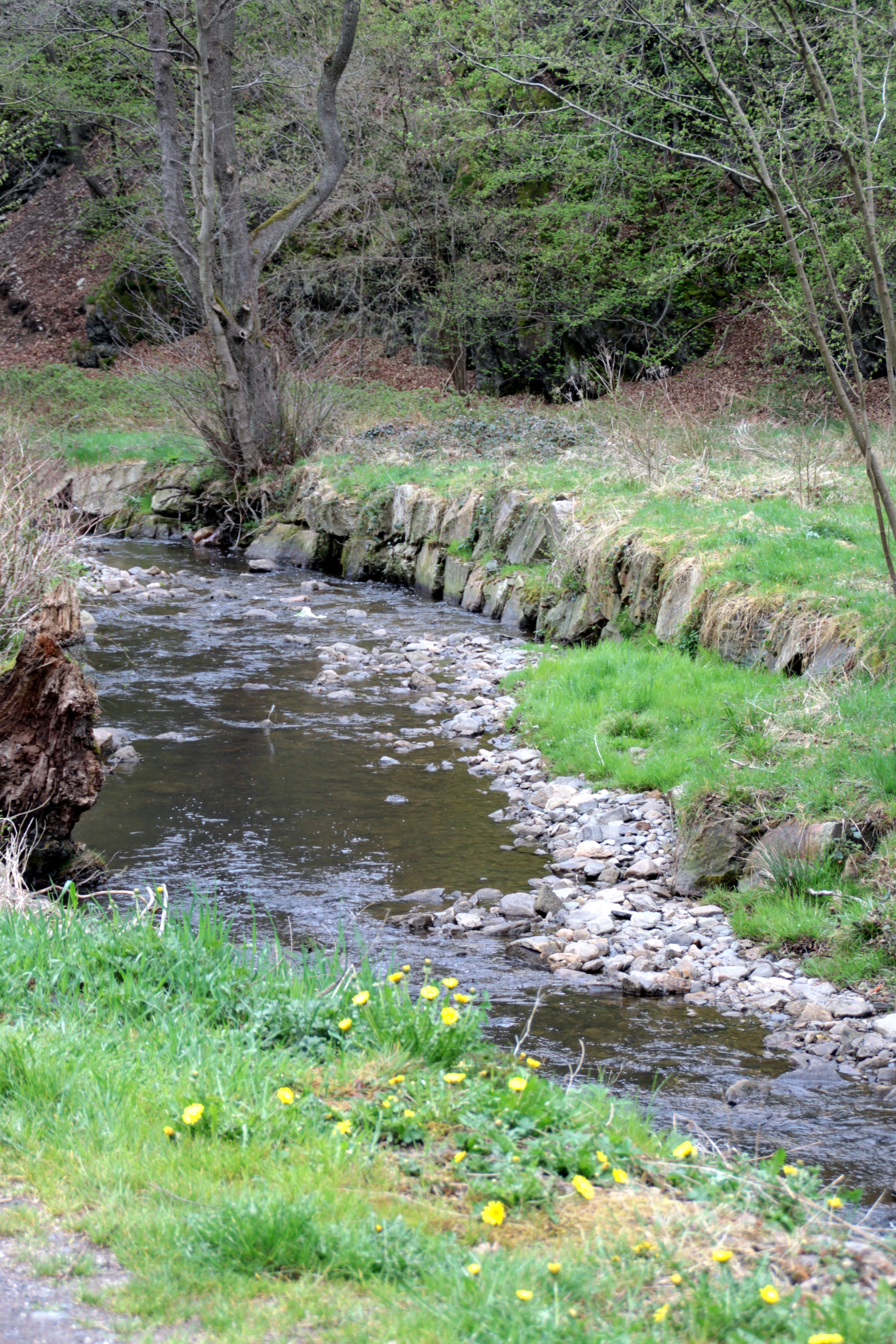 D'Eau Rouge tëscht Marteau a Winamplanche